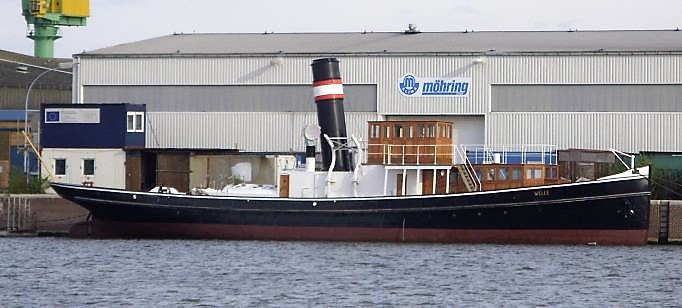 Bereisungsdampfer „Welle“ - Fischereihafen Bremerhaven, ehem. Salzkaje Das abgebildete Objekt ist ein geschütztes Kulturdenkmal in der Freien Hansestadt Bremen, mit der Nr. 1918 beim Landesamt für Denkmalpflege registriert.